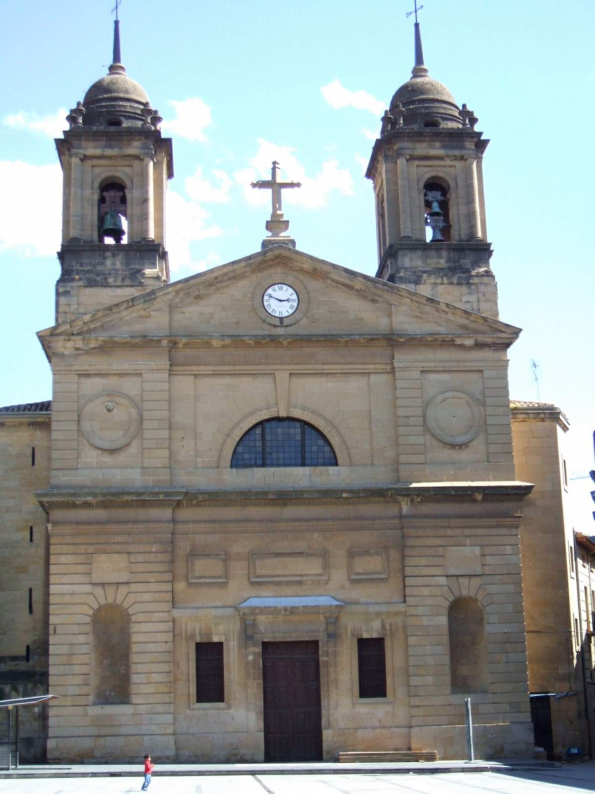 Iglesia de San Juan Bautista (Estella, Navarra)